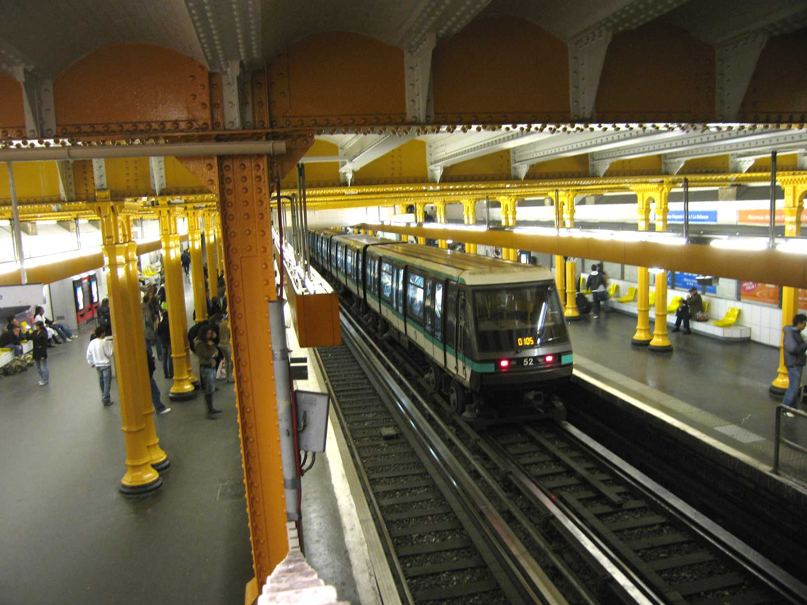 Métro de Paris, Station Gare de Lyon (ligne 1), Paris, France